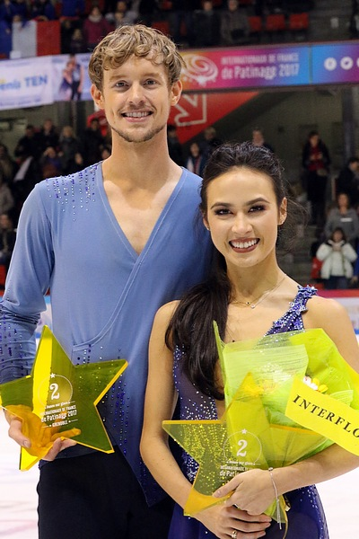 Мэдисон Чок и Эван Бейтс на подиуме этапа Гран-при во Франции 2017.